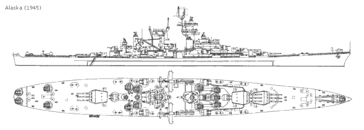 USS Alaska (CB-1) Overview